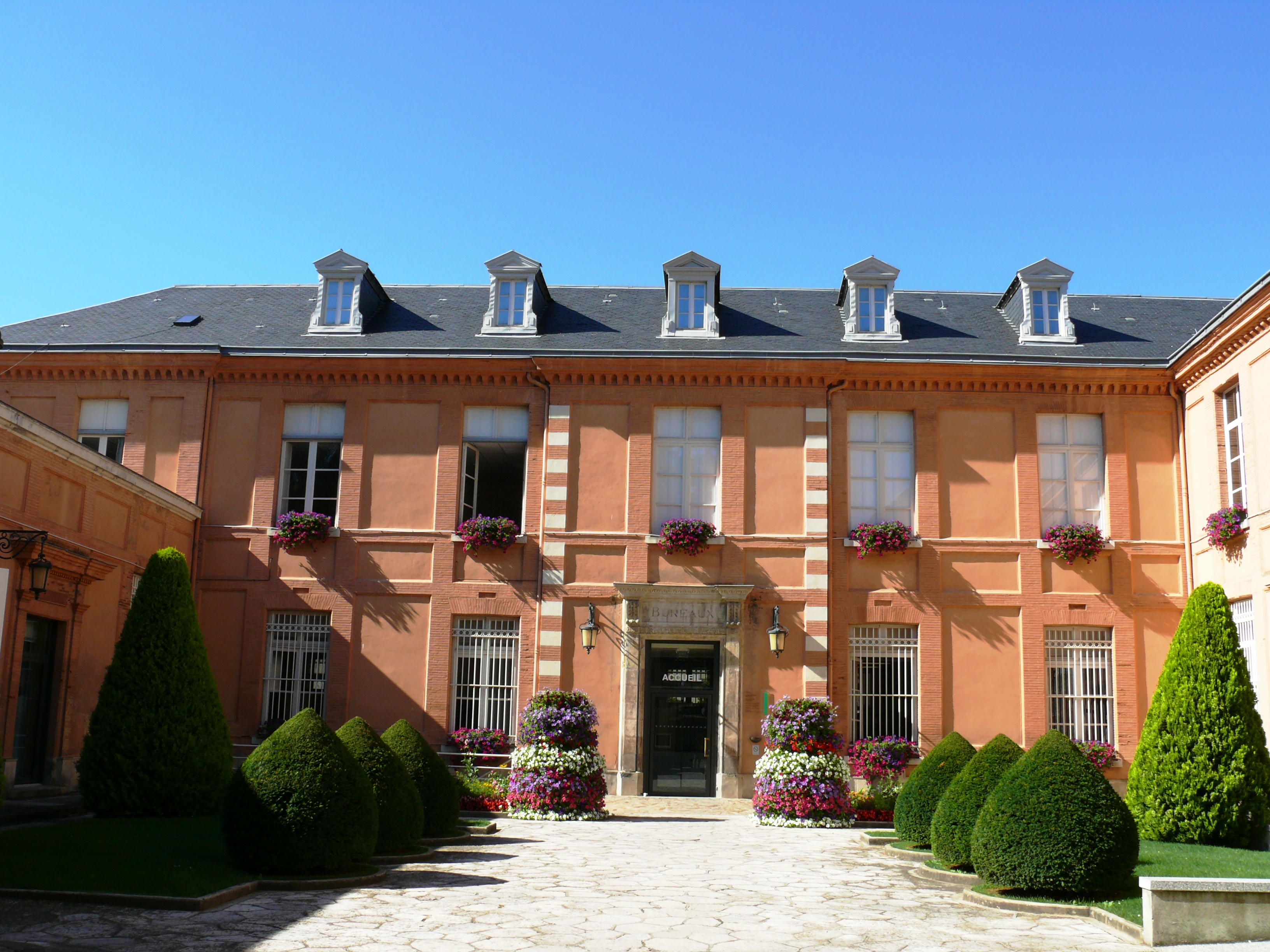 Pamiers (Ariège, France) - Hôtel de ville